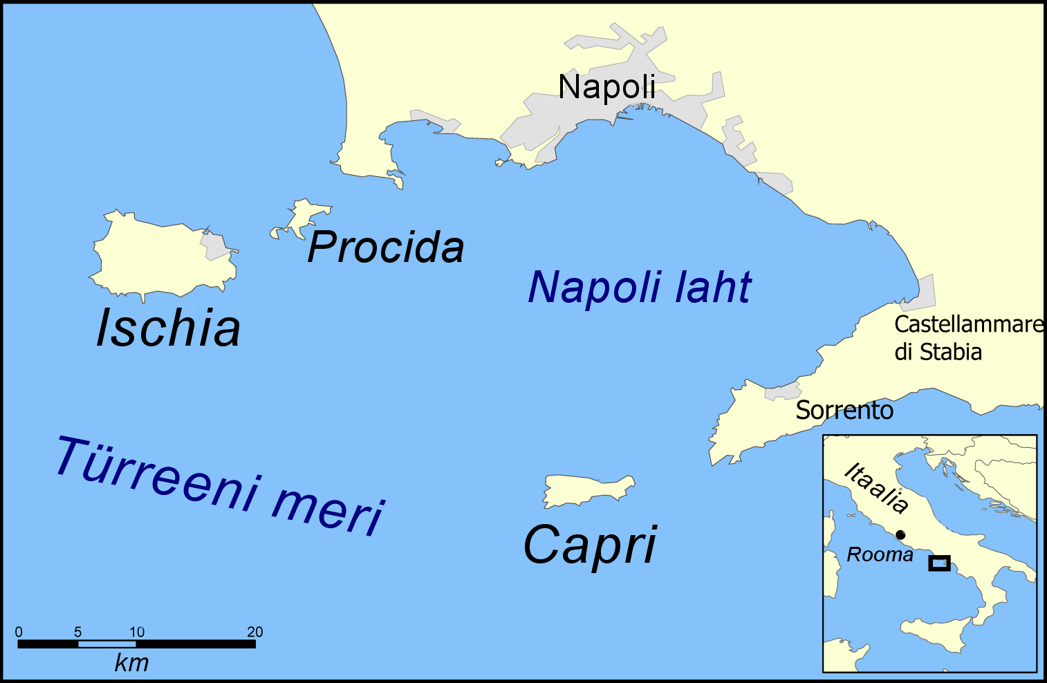 Napoli lahe kaart